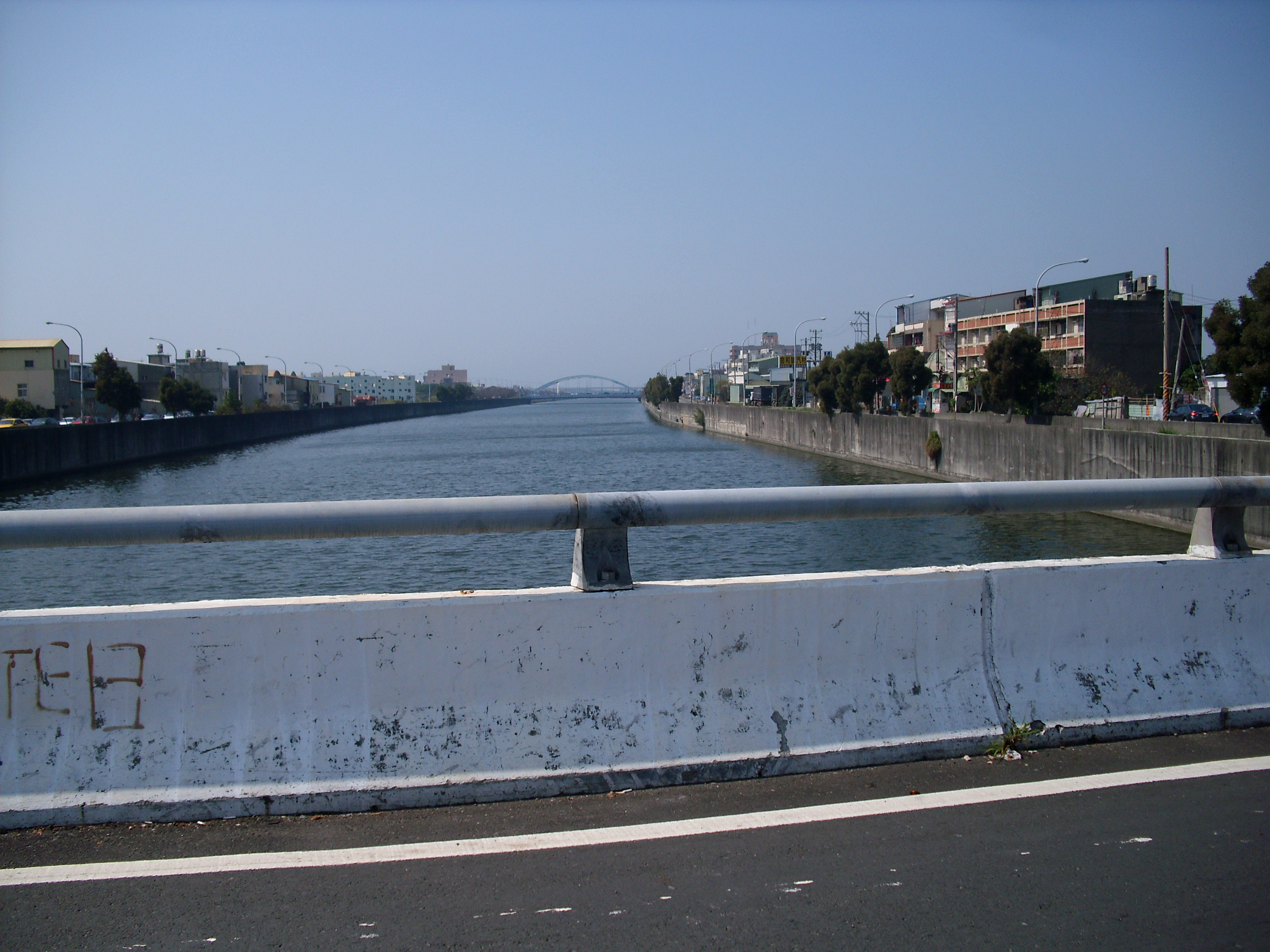 Bân-lâm-gú: 台135線福鹿橋頂過員林大排